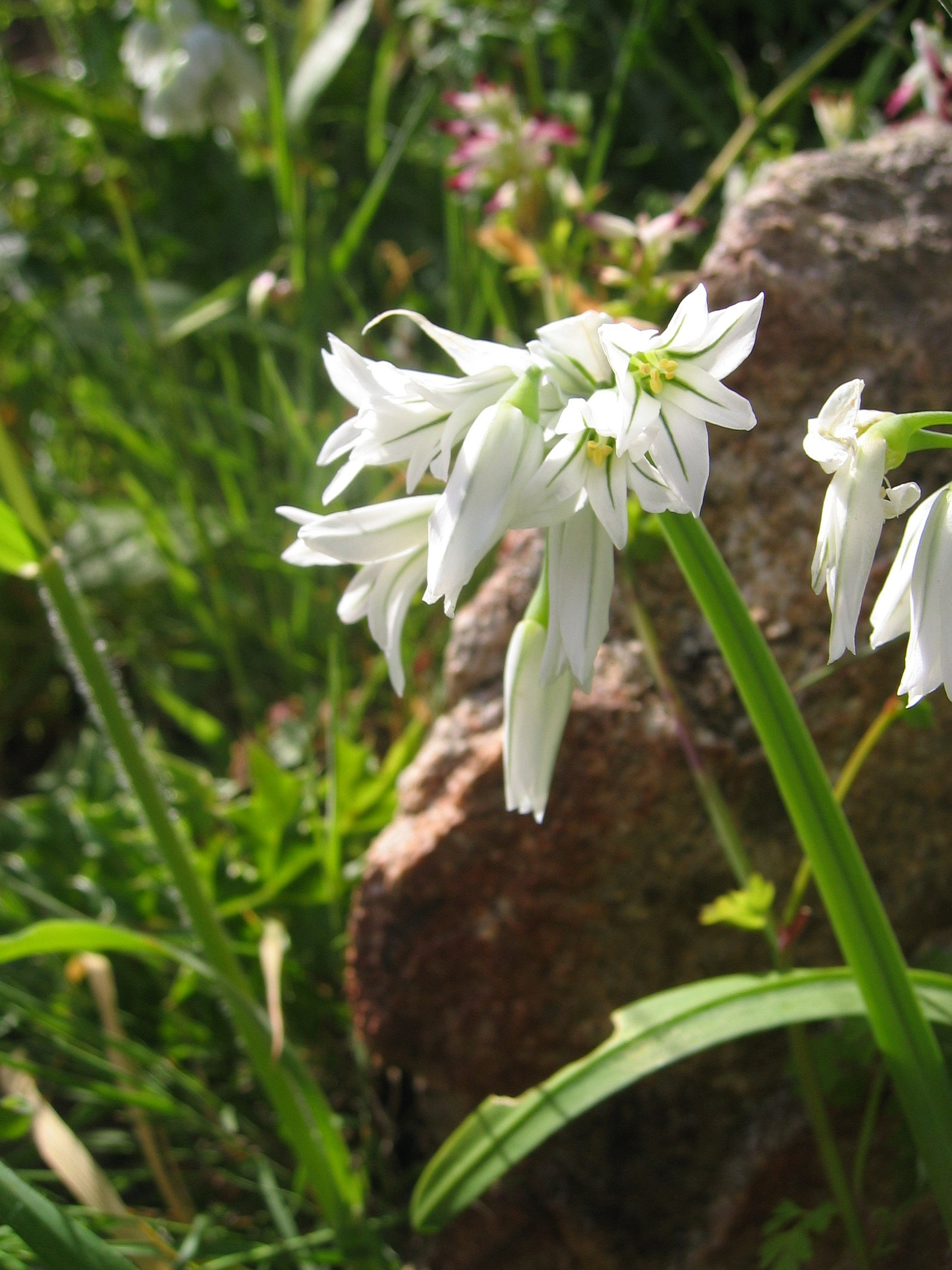 Allium triquetrum Calvi (Capu di a Veta), Corse, France